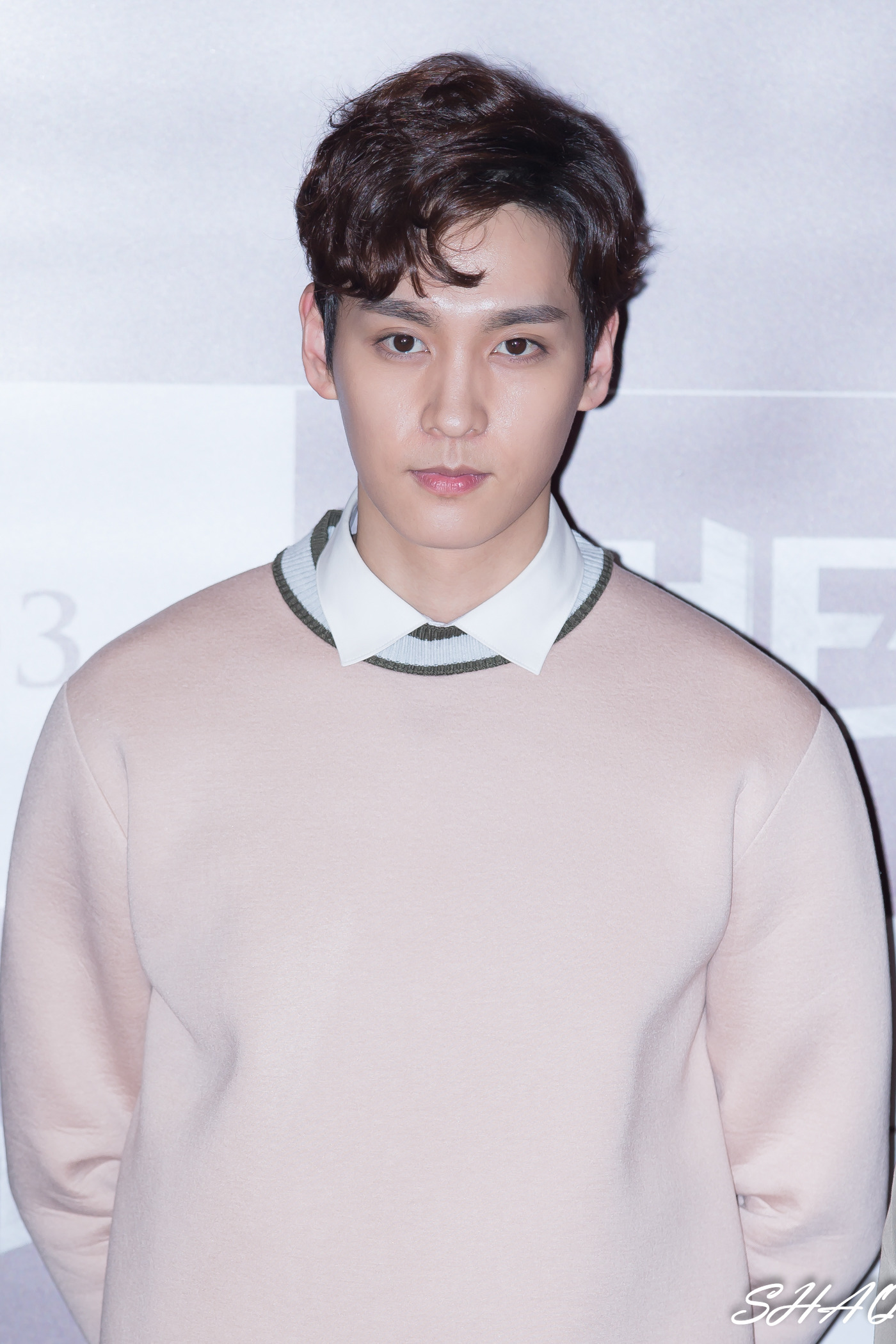 160329 영화 커터 VIP 시사회 - 최태준